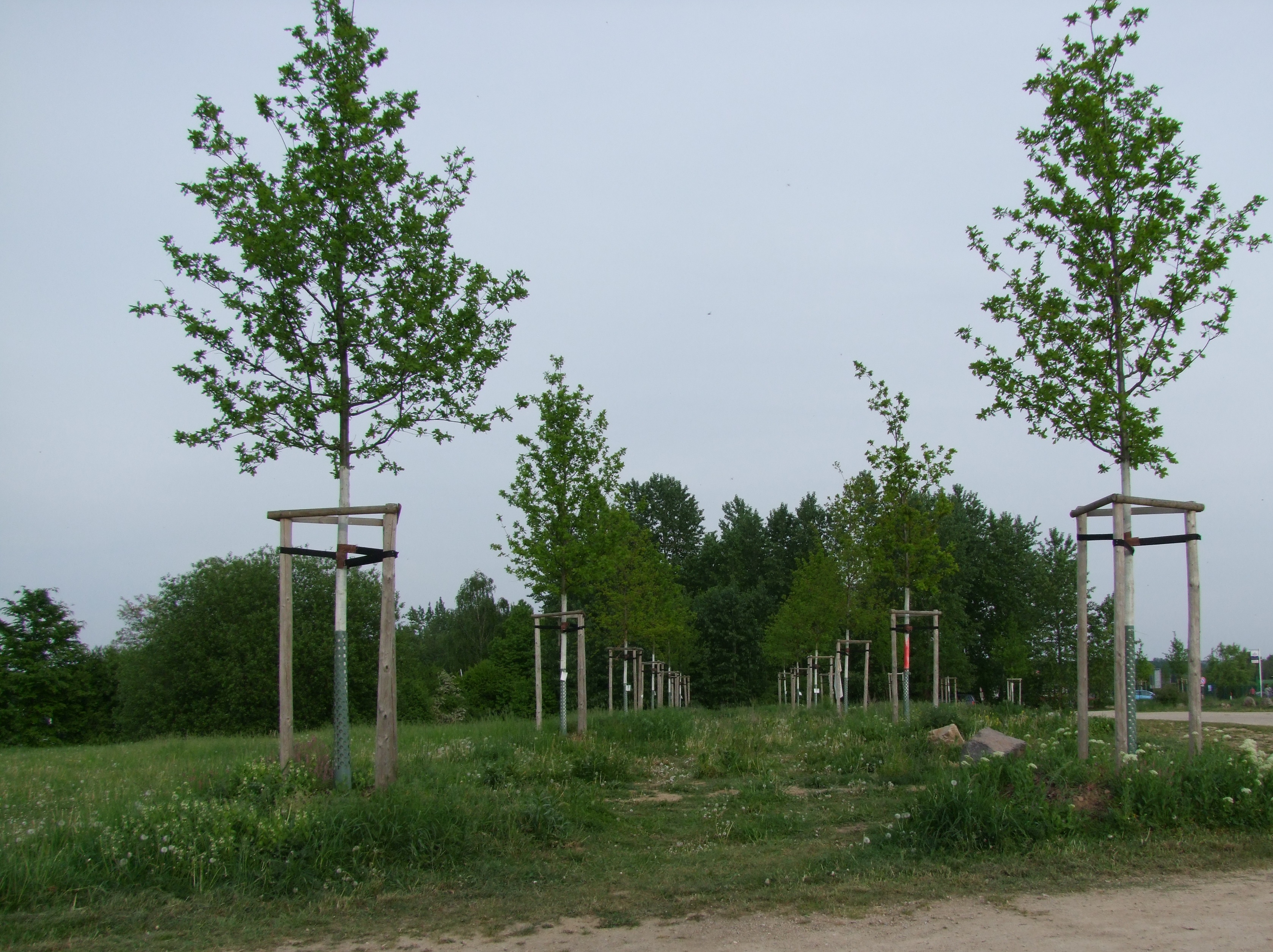 Blick auf die für den Fahrradweg entstehende Allee neben dem Wassersportsee Zülpich